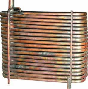 Evaporador de tubos de cobre